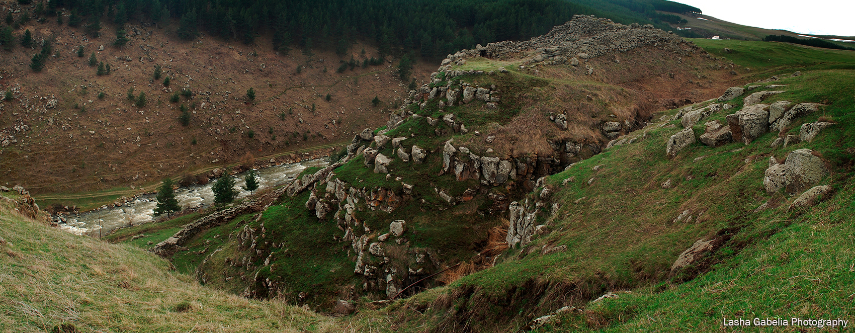 ავრანლოს ციკლოპური ციხე